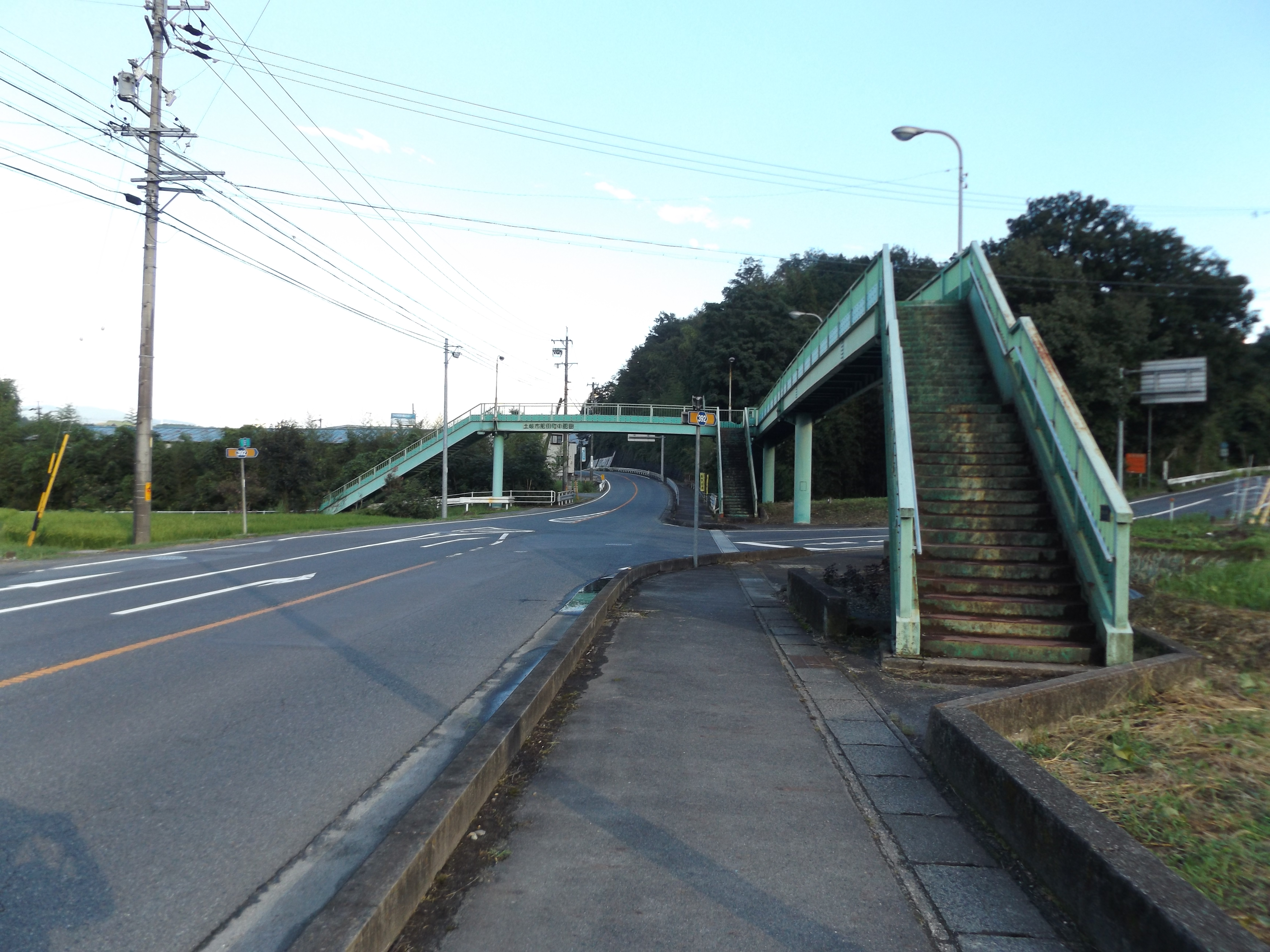 岐阜県土岐市肥田町中肥田にある岐阜県道69号土岐市停車場細野線と岐阜県道392号肥田下石線の交点。県道392号はここが起点。